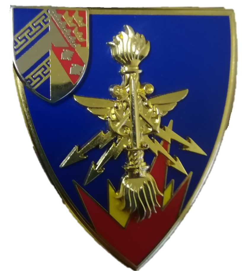 Insigne de l'EPMu CLE